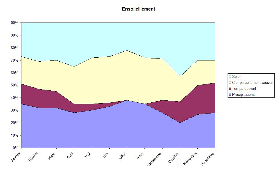 Pourcentages mensuels de jours ensoleillés, partiellement couverts, couverts ou avec précipitation, à Dudley (Géorgie, Etats-Unis)